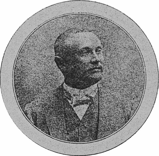 František Vydra (1869 - 1921), Český továrník a výzkumník.